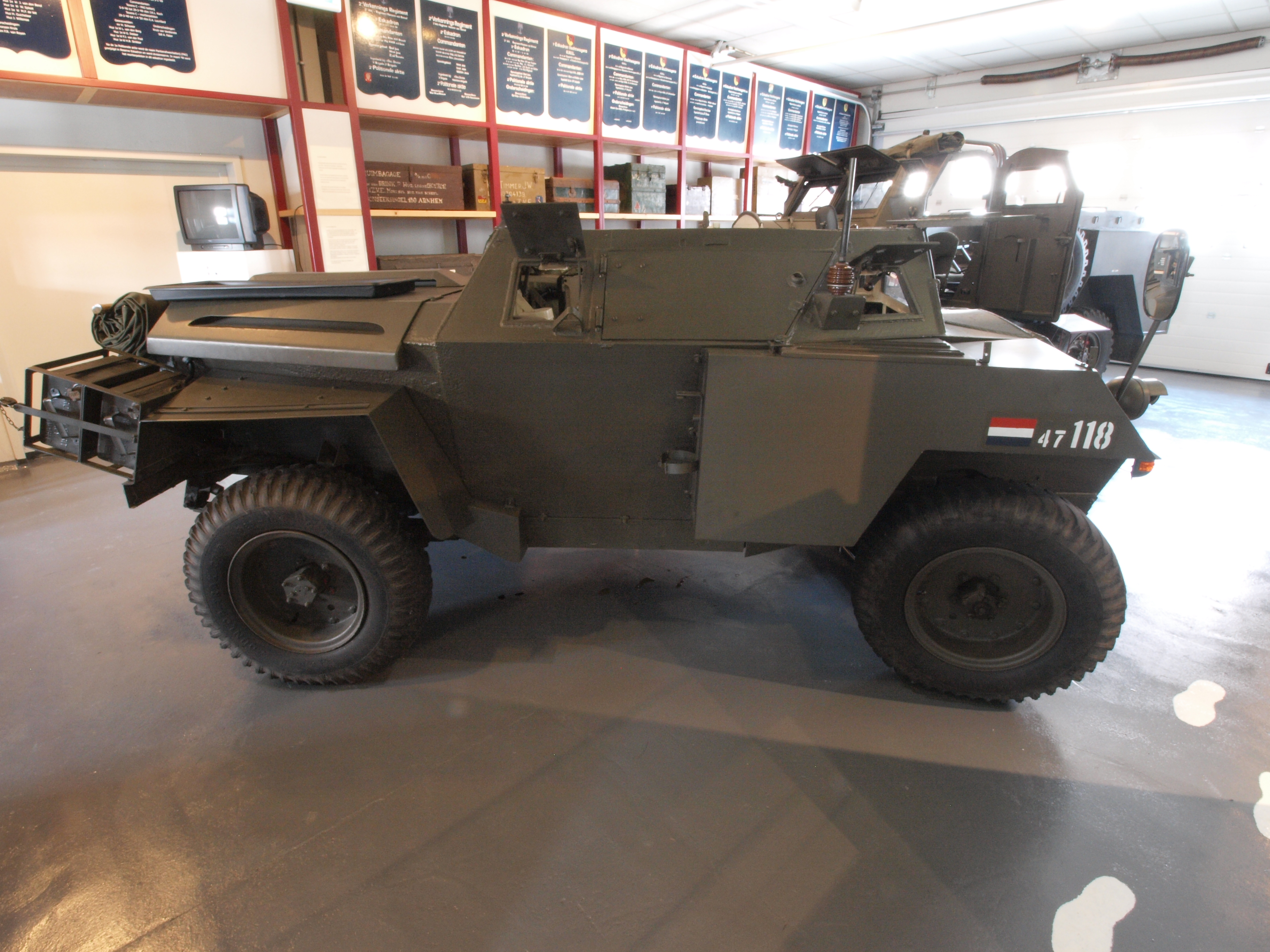 Humber Mk I